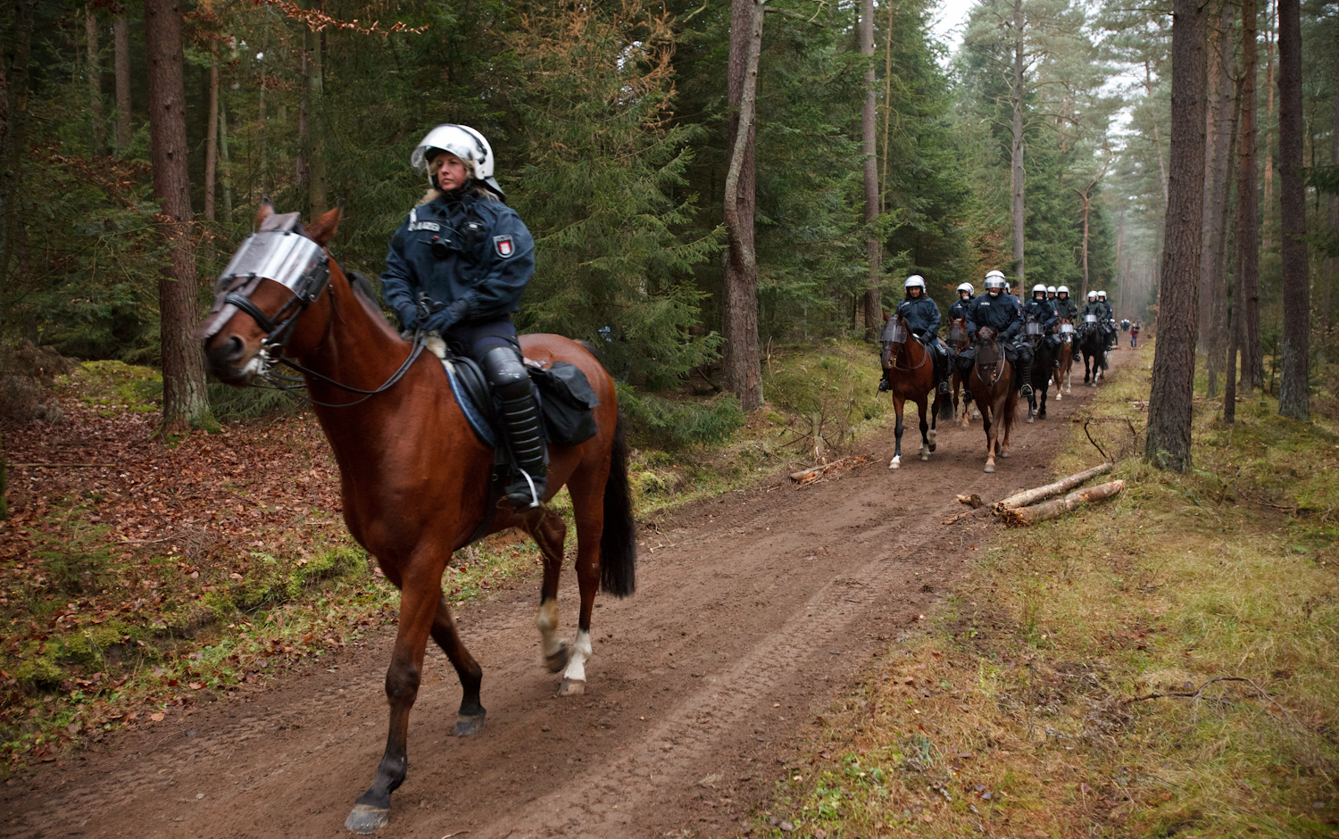 Proteste gegen den Castor-Transport an den Schienen bei Metzingen: Polizei Reiterstaffel